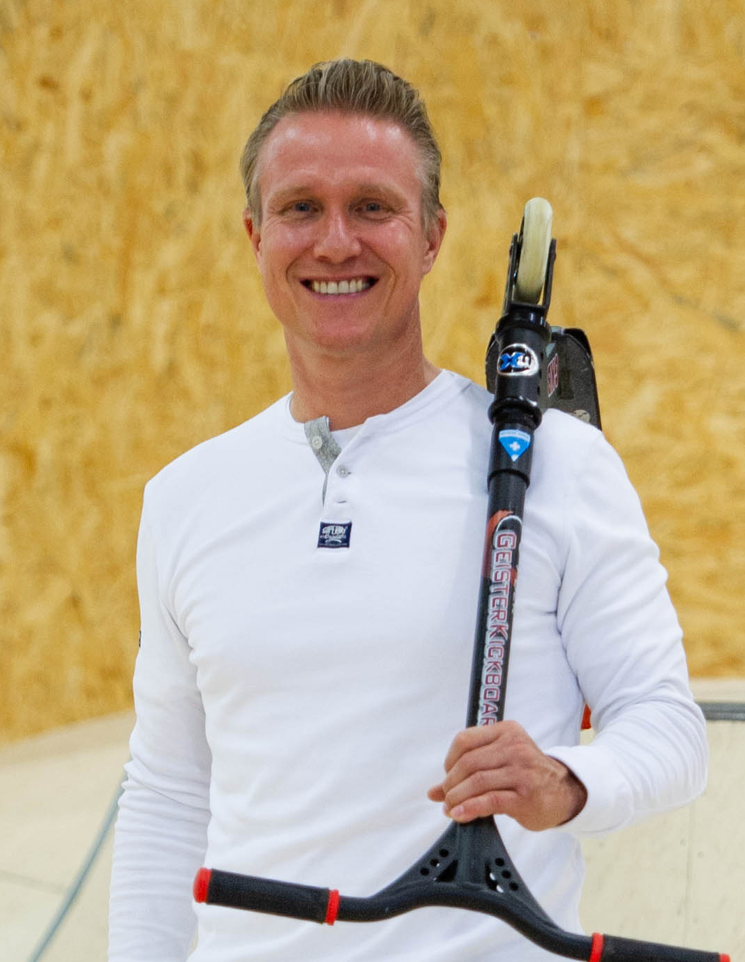 Autorenbild Stefan Baiker